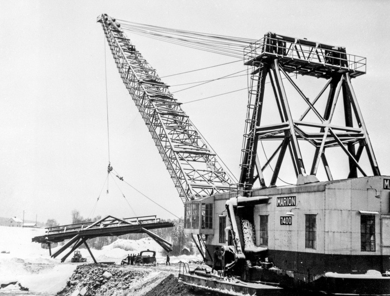 Bortlyftning av brospann med grävmaskinen Marion 7400s hjälp. Kvistforsens kraftstationsbyggnad, Skellefteå.